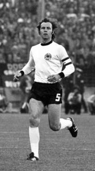 zoom-in